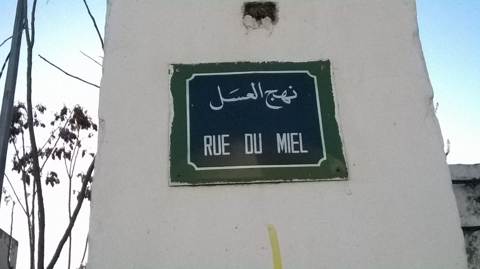 Bab Laassal باب العسل